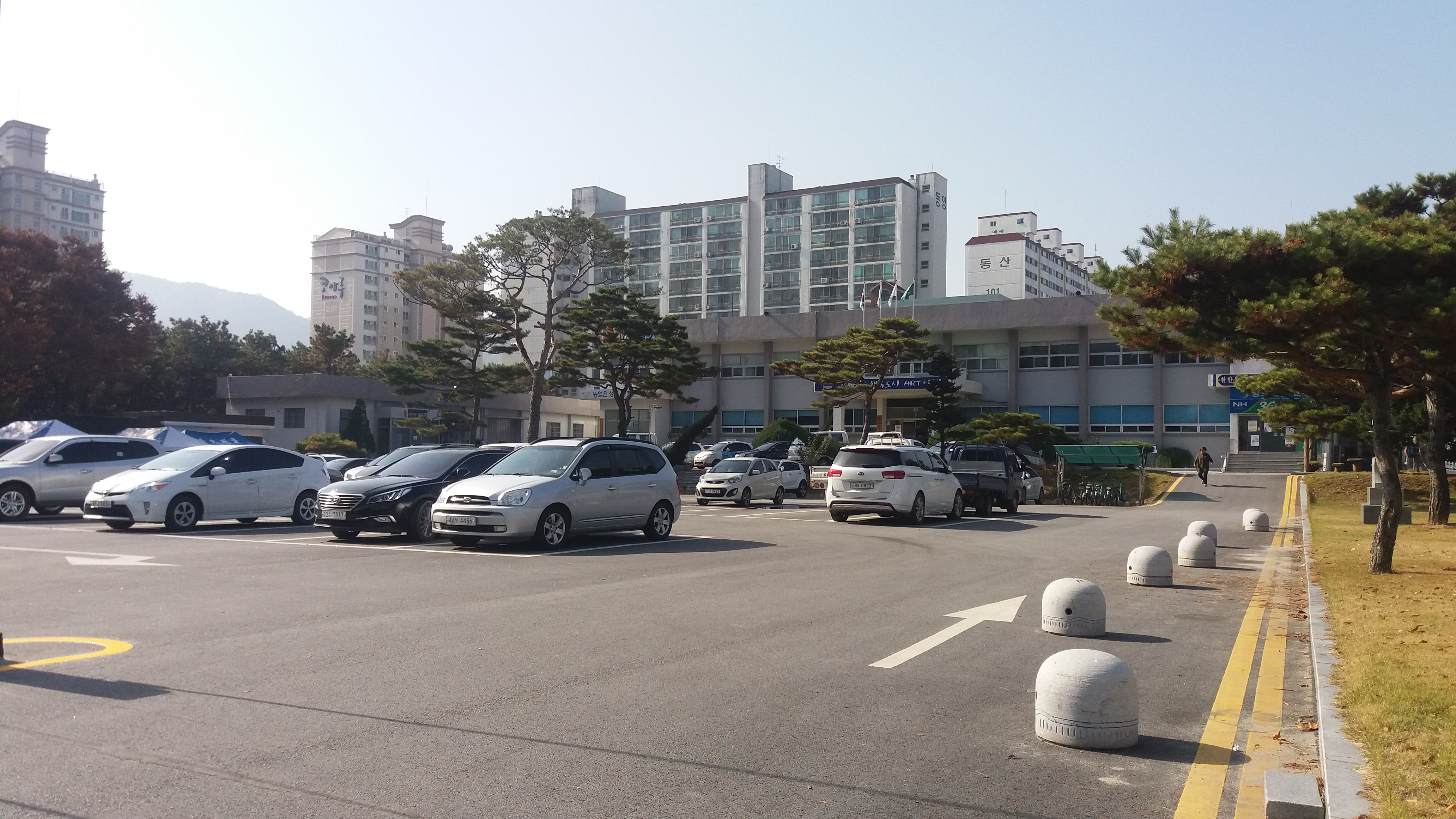 이천시 장호원읍사무소